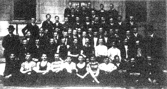 Az első munkás sportegyesület Budapesten, a Munkás Testedző Egylet